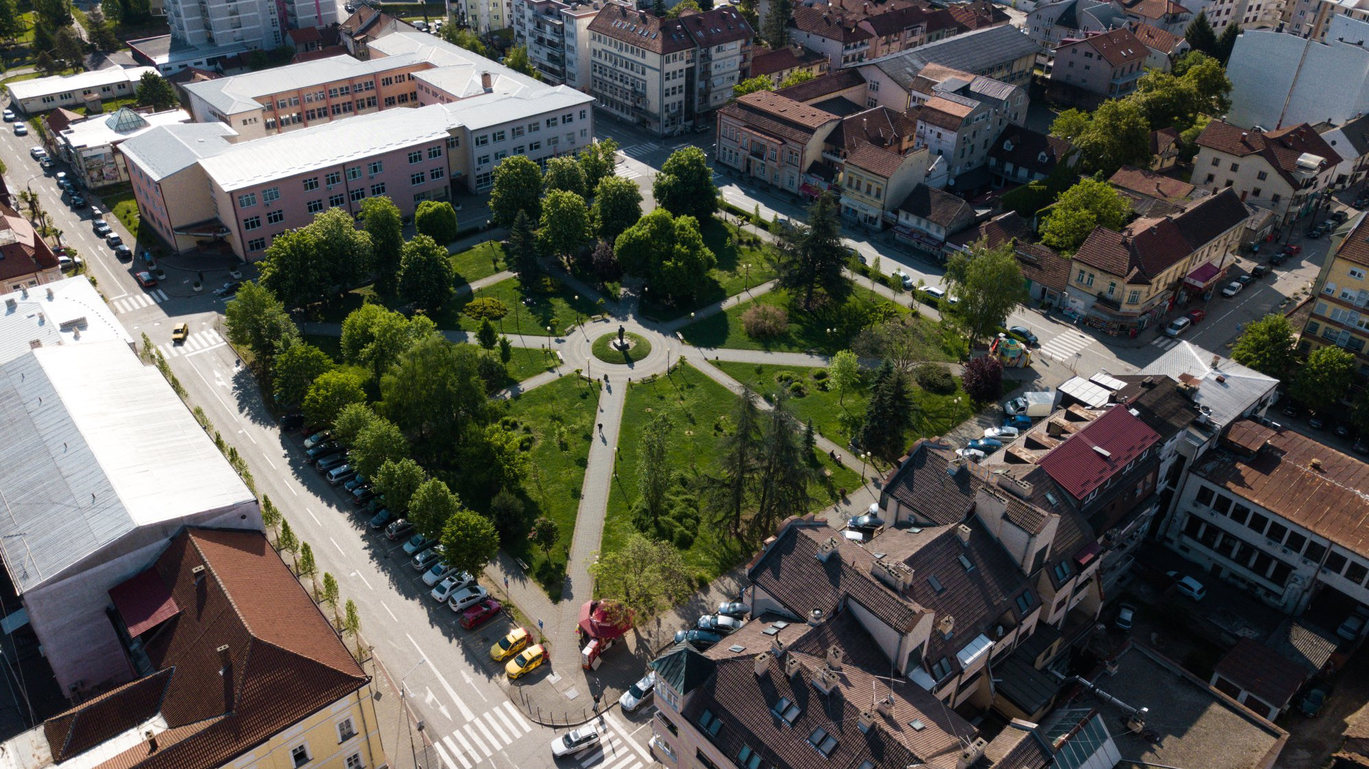 Srpskohrvatski / српскохрватски: Loznica iz drona